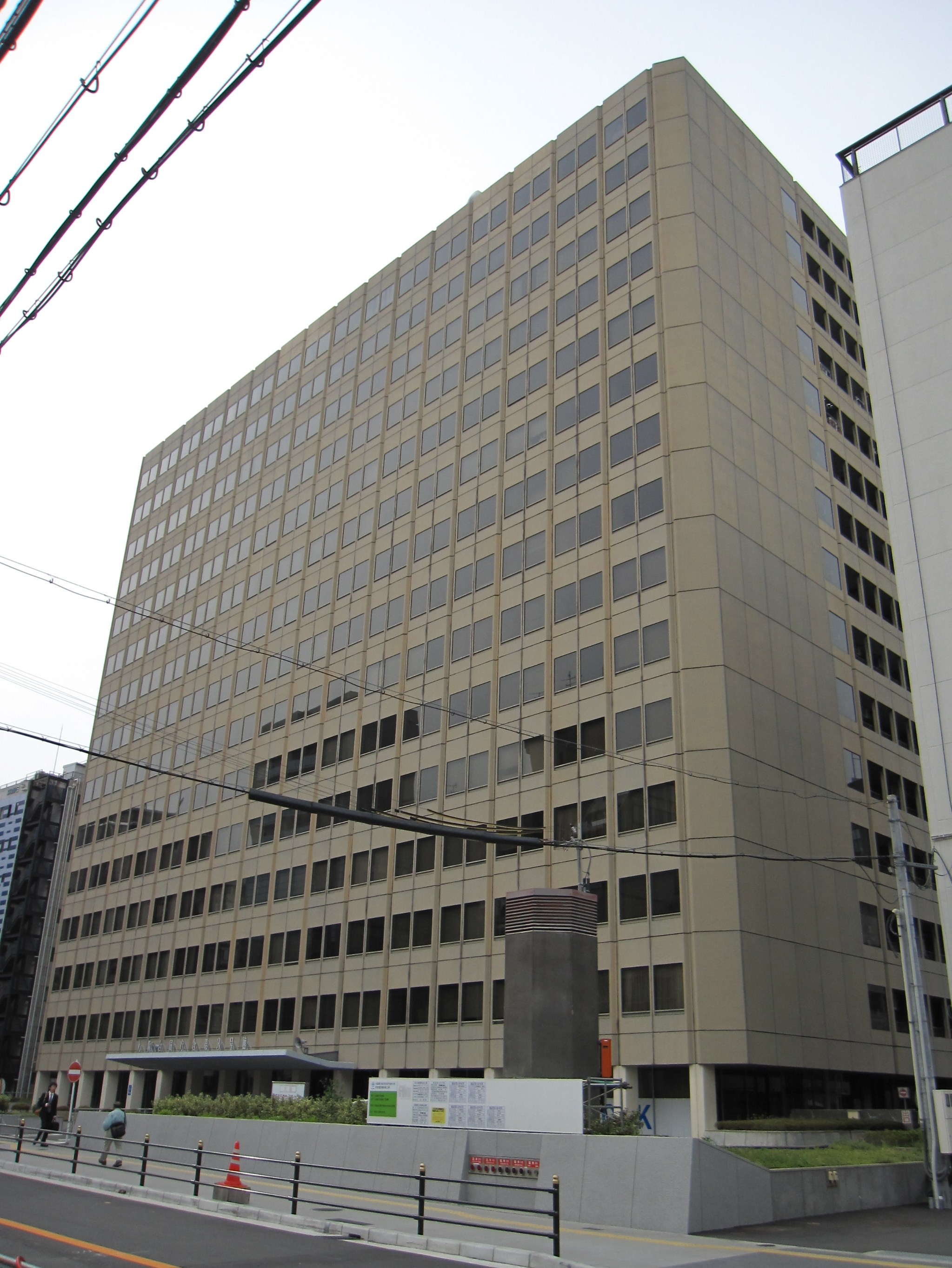 大阪合同庁舎第3号館（入居官署一覧）